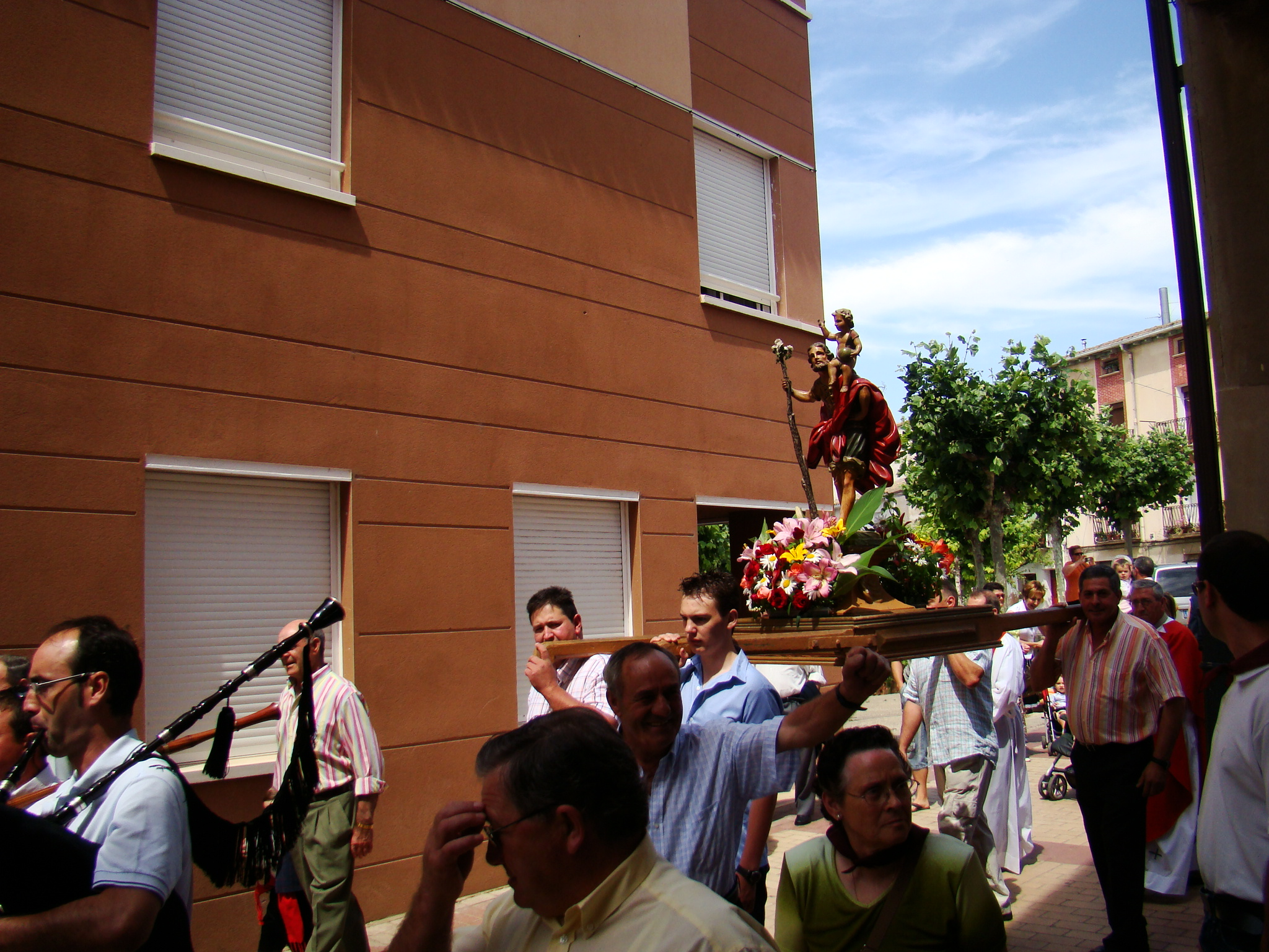 Procesión el día de San Cristóbal